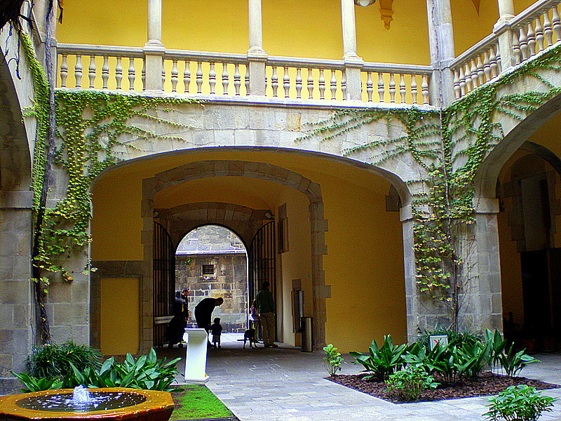 Barcelona - Pati del Palau del Lloctinent